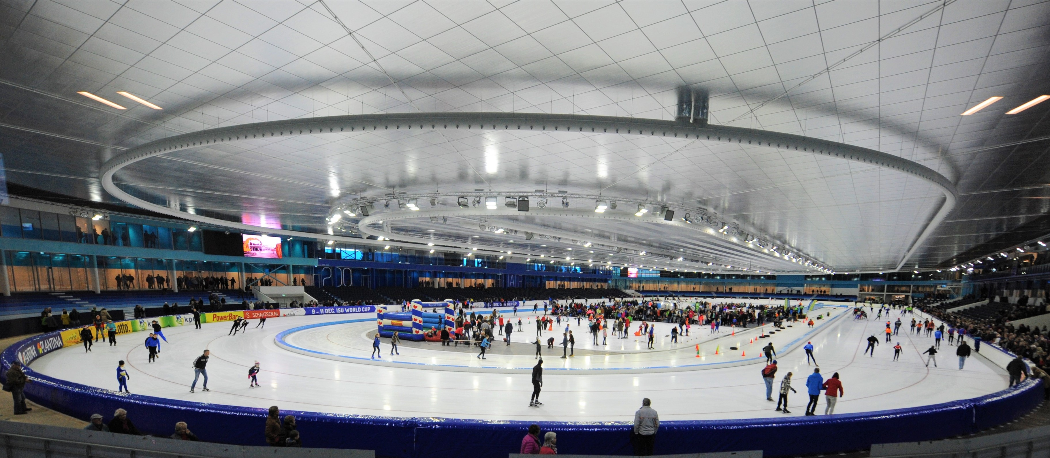 Schaatshart Thialf